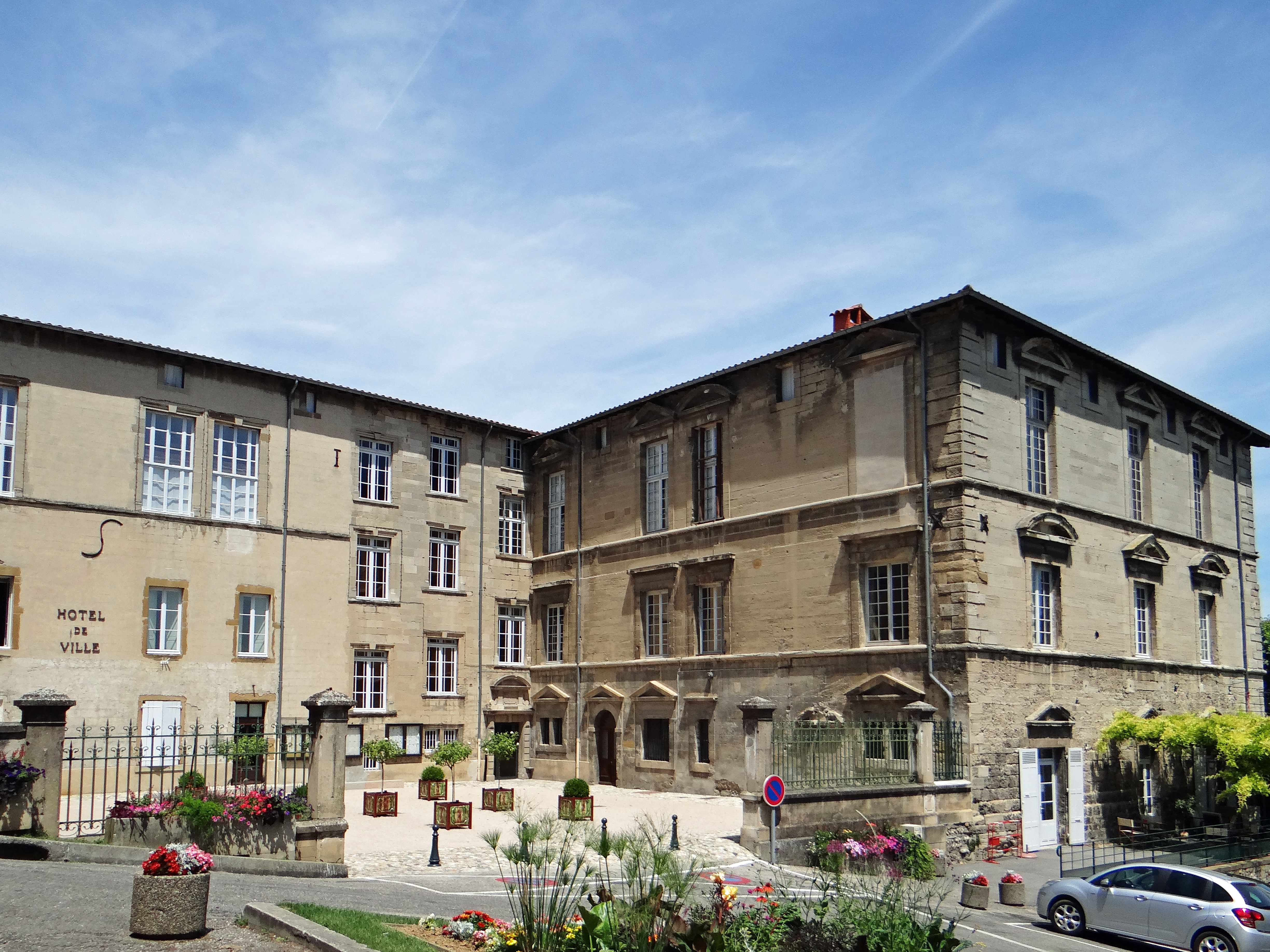 Château de Roussillon - Extérieurs - Aile centrale du château et façade ouestde l'aile est du château